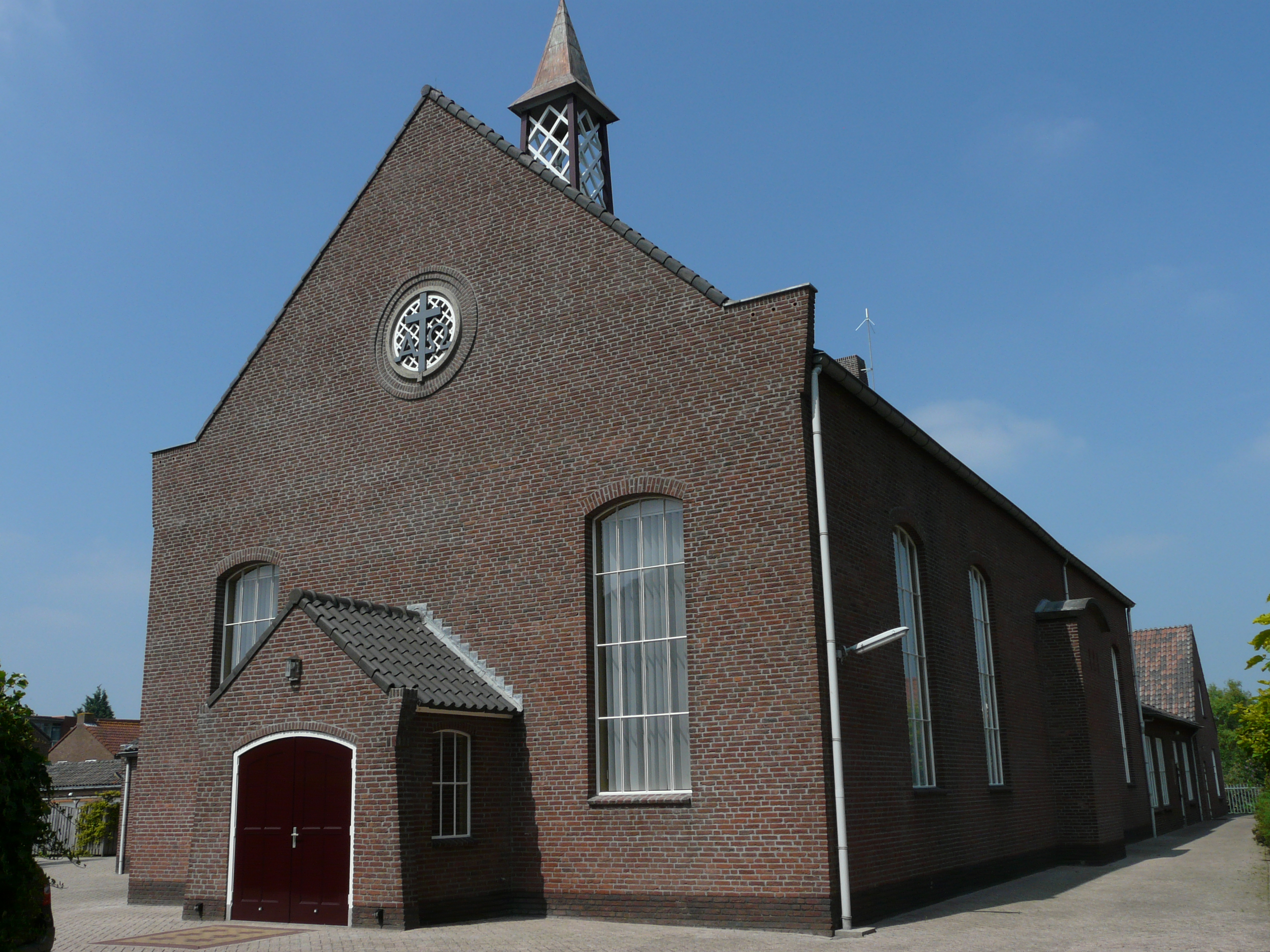 Zicht op een deel van de Gereformeerde kerk Almkerk